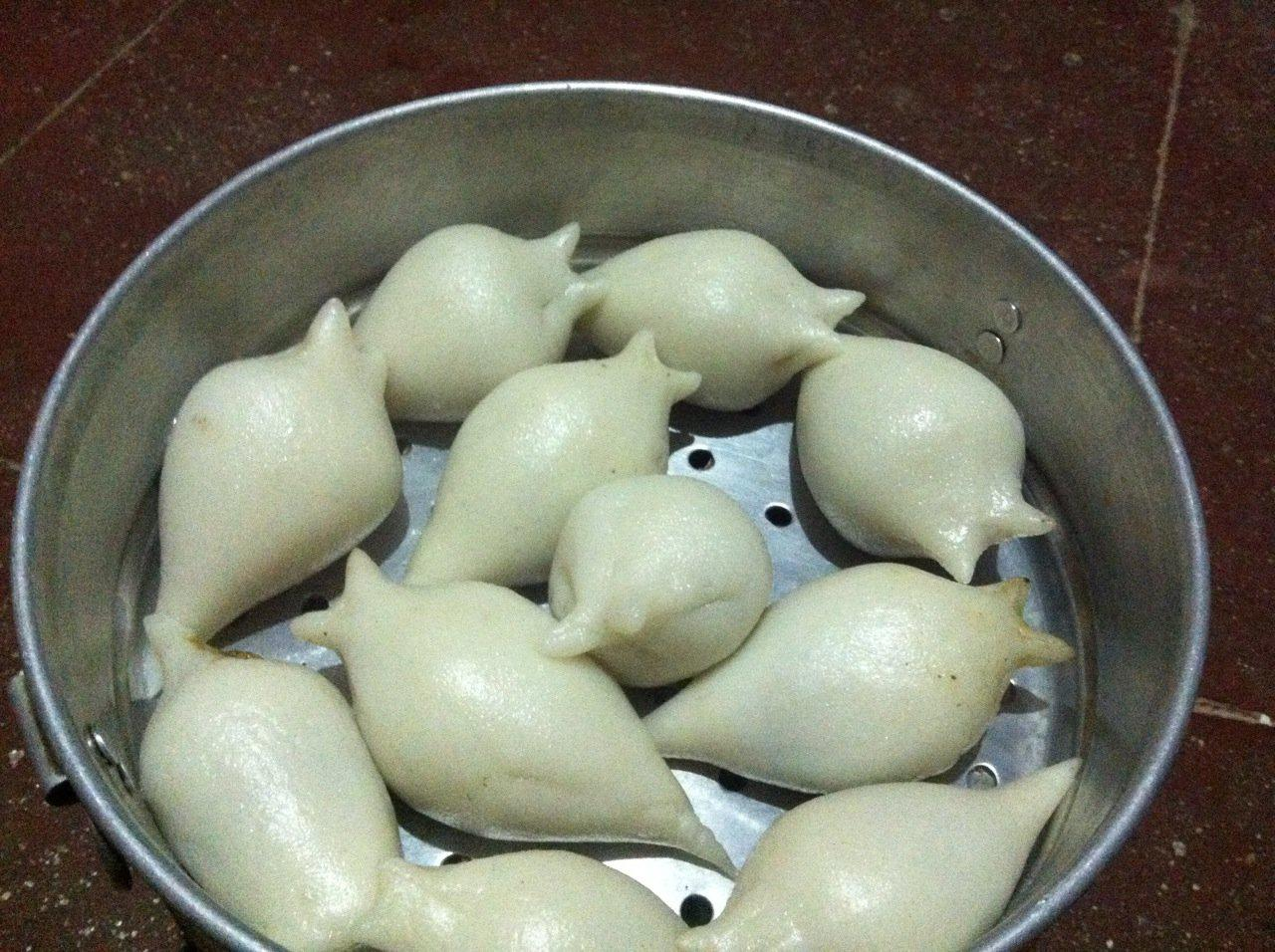 नेपाली: नेवारी परम्परा अन्तर्गत बनाइने विशेष मिष्ठान्न "योमरि"